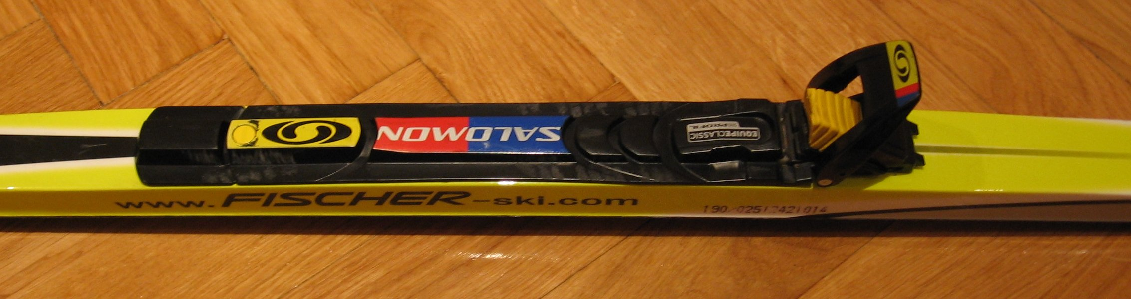 Skilanglaufbindung